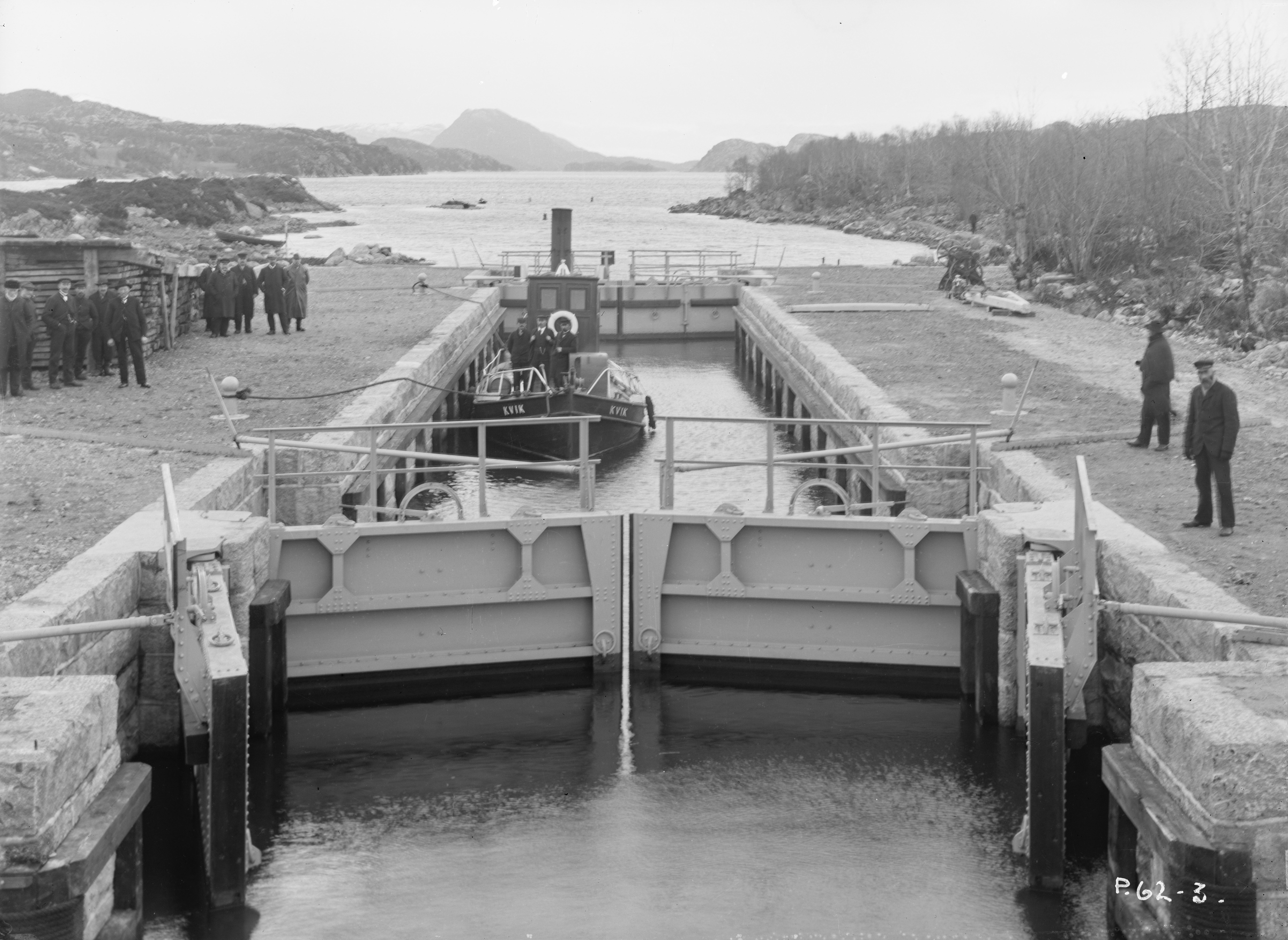 Bildet er hentet fra Arkivverket. Sluse, Skjoldstrømmen, Stavangers amt Arkivinstitusjon : Riksarkivet Arkivnavn : Havnedirektoratet Sted : Norge, Rogaland, Tysvær, Skjoldstrømmen Emneord: Havneutbygging, Sluser, Båter, Menn Avbildet